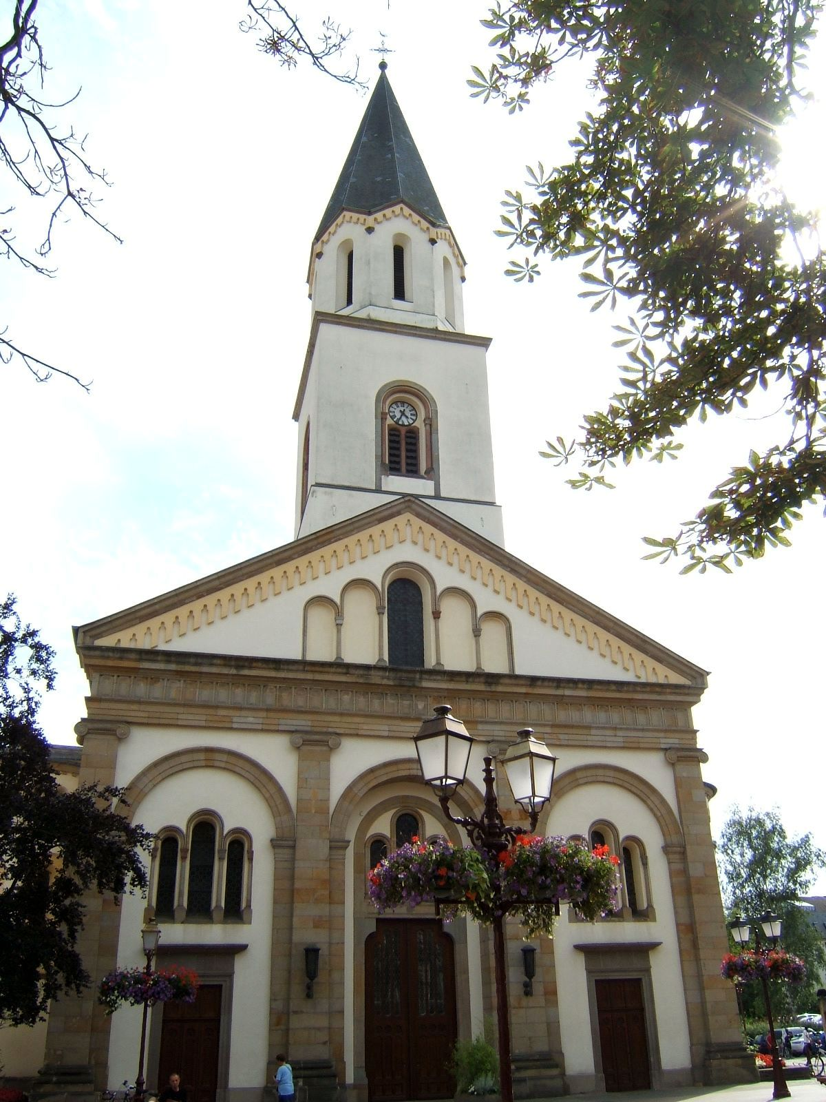 Church in Ettelbruck, Luxembourg